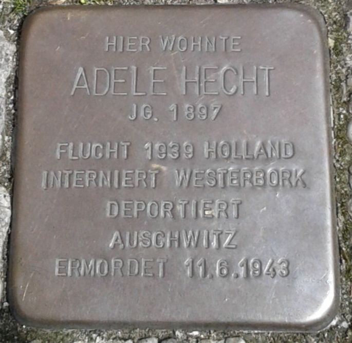 Stolperstein Datteln Tigg 9 Adele Hecht